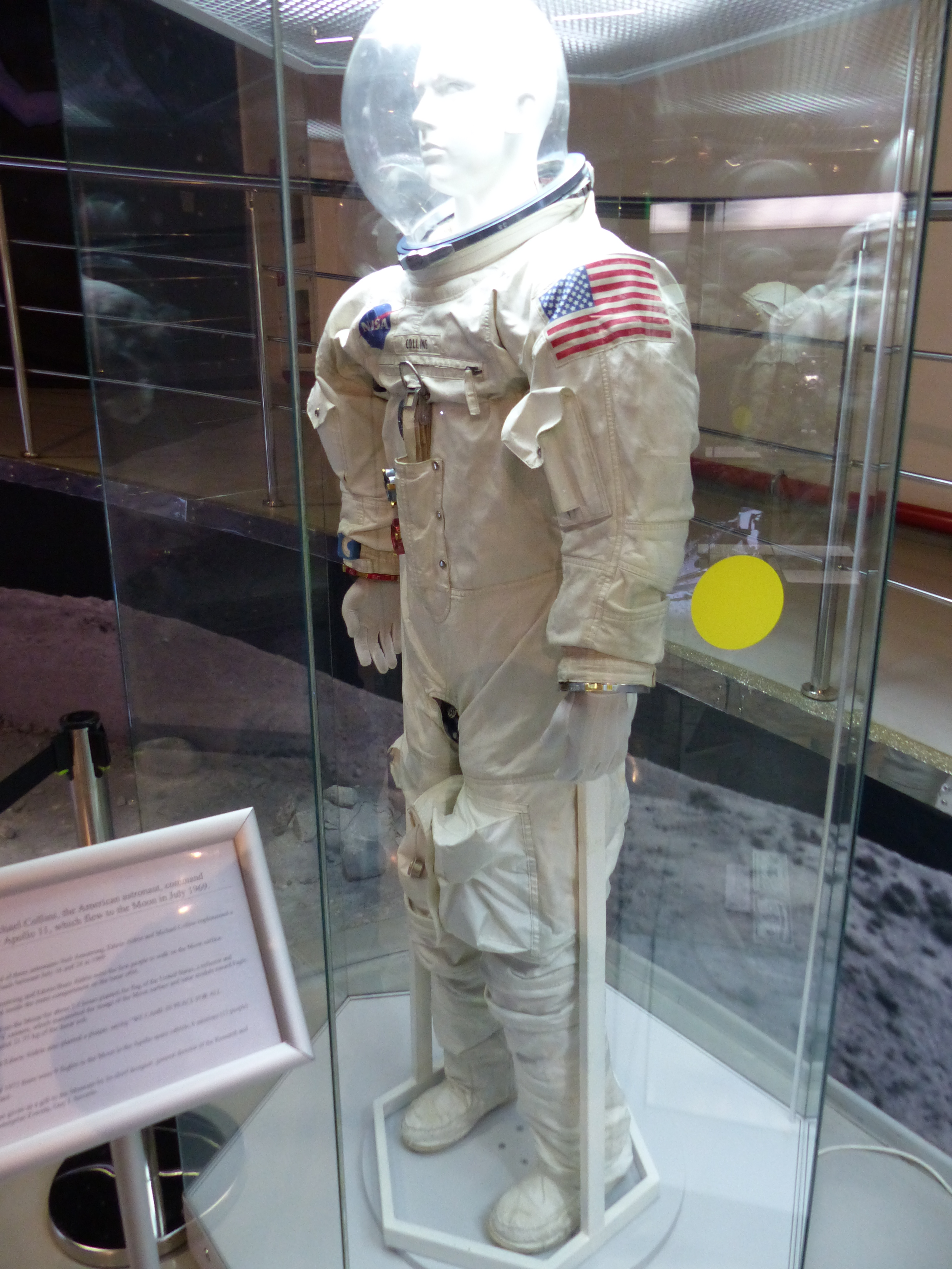 Spacesuit of Michael Collins, the American astronaut, command module pilot for Apollo 11, which flew to the Moon in July 1969.